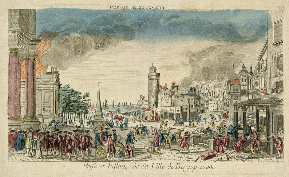 Bergen op Zoom, Prise et Pillage de la Ville de Bergop-zoom, ca. 1760